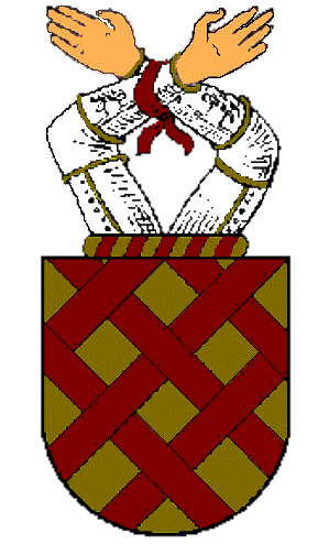 Brasão da Família Correia